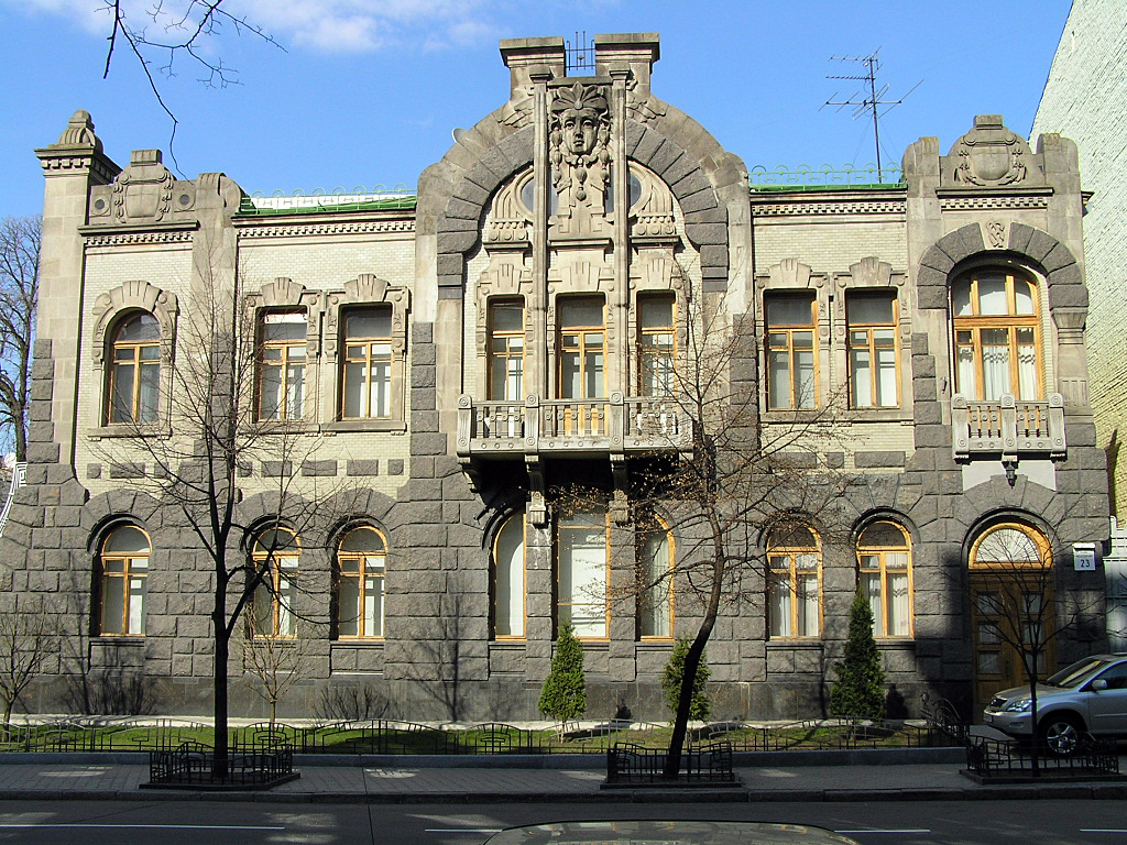 Київ, вул. Лютеранська, 23. Маскарон.